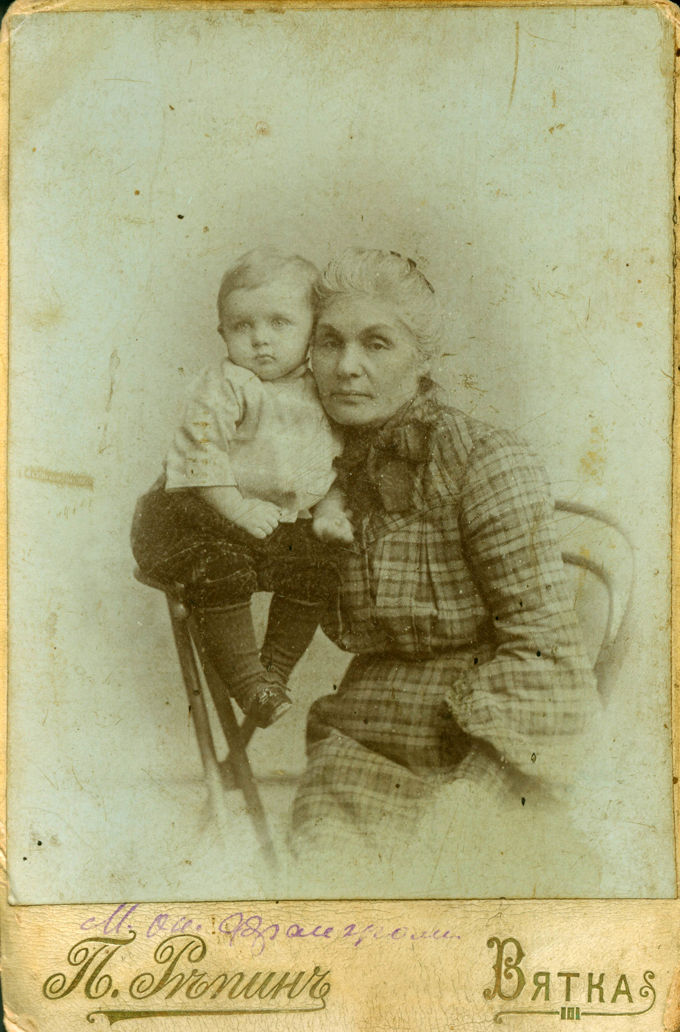 Жена русского революционера Тимофея Франжоли